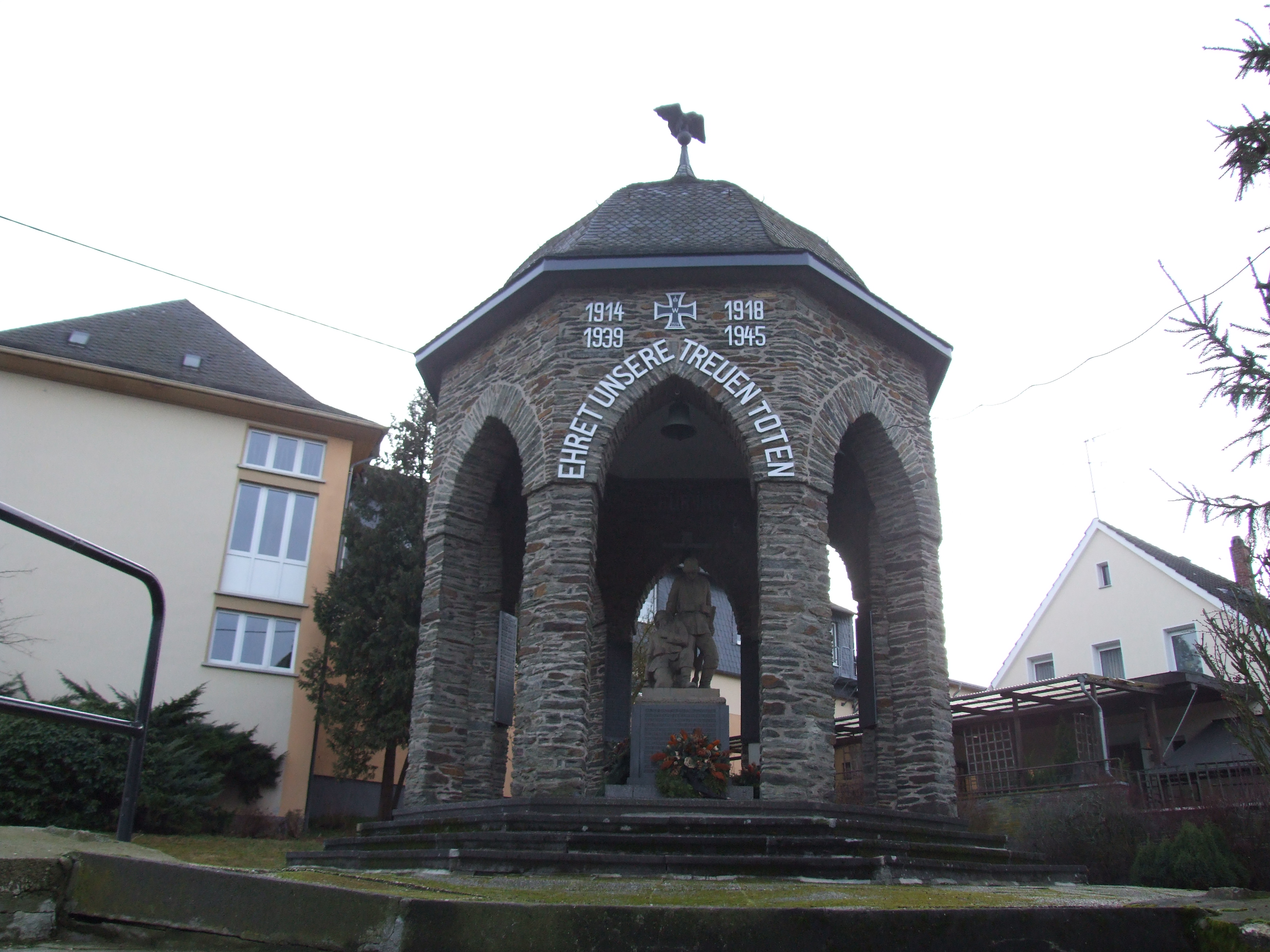 Sohren, Hauptstraße, Ecke Denkmalstraße: Kriegerdenkmal; Sandsteinskulptur unter Oktogon; bauliche Gesamtanlage